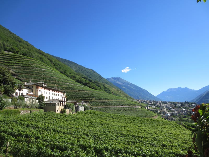 Blick auf Bianzone